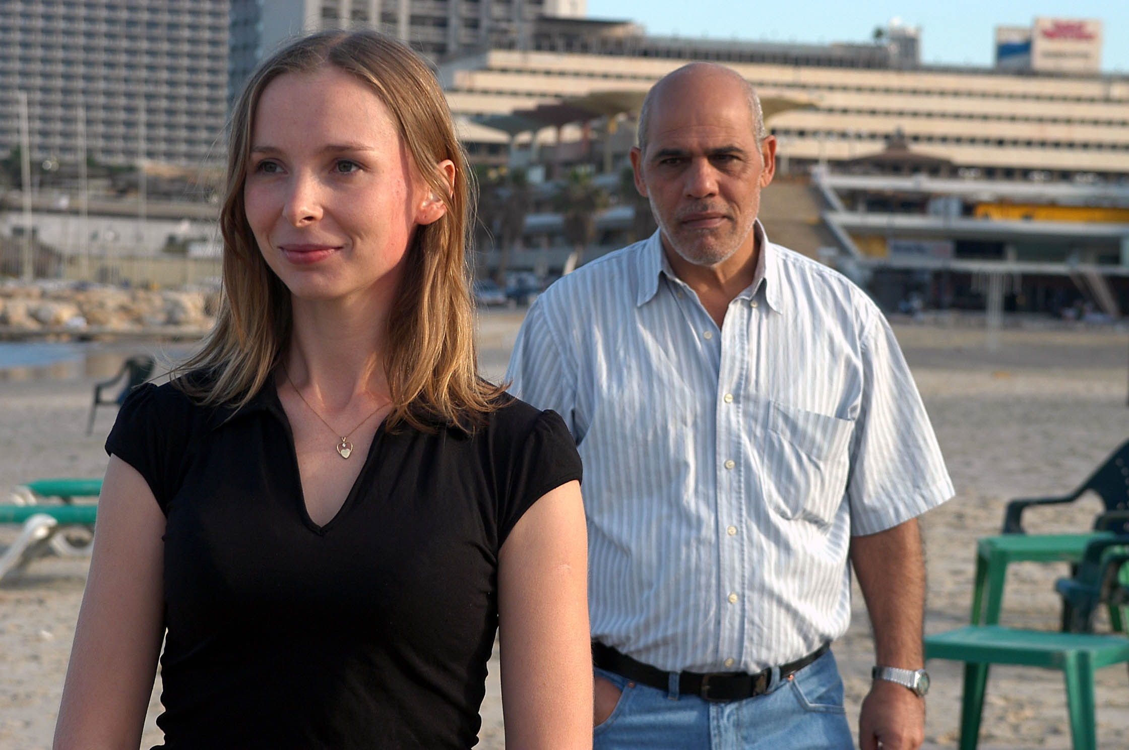 איזה מקום נפלא. צילום צחי צלניקר